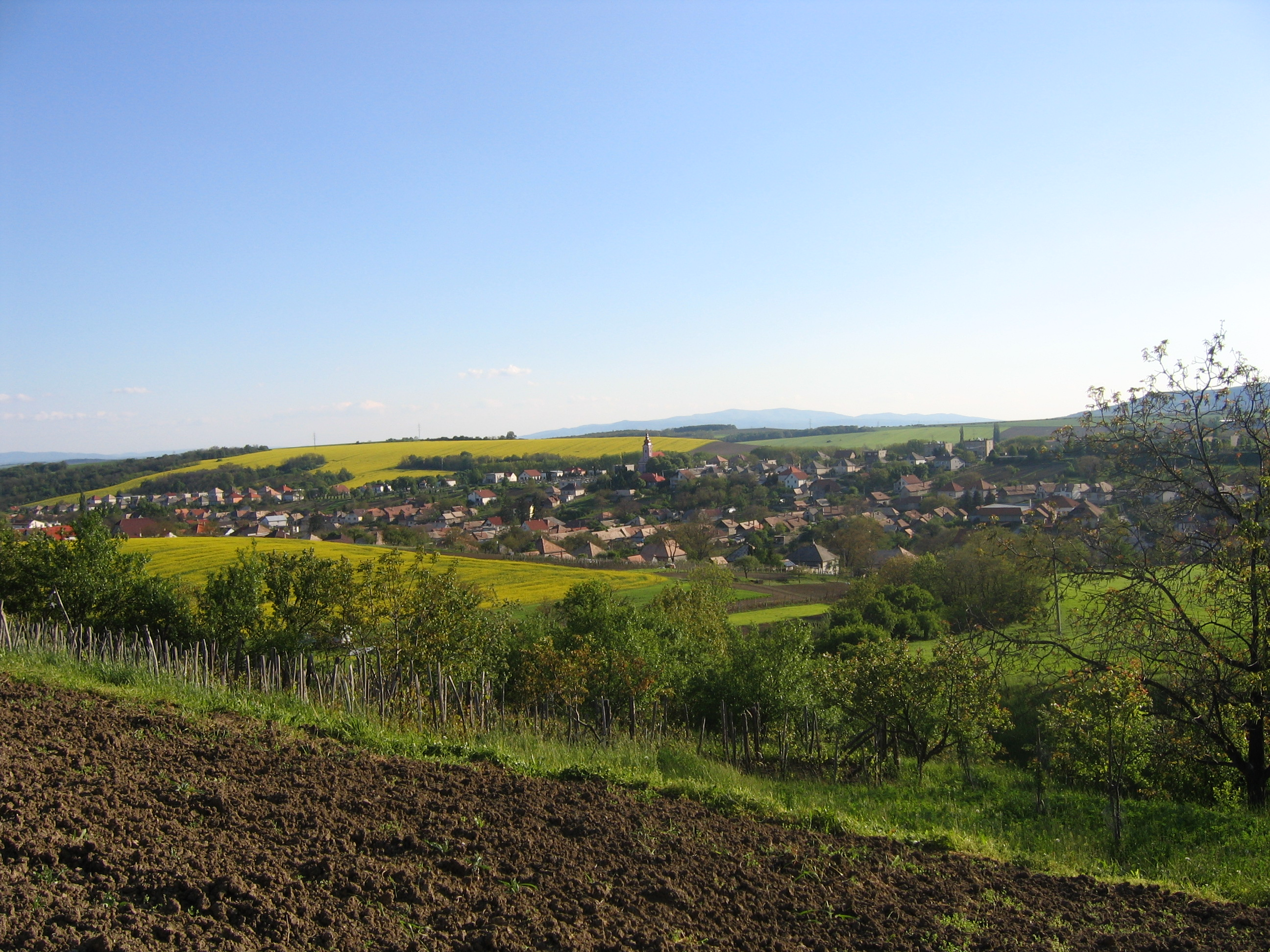 Beschreibung: de: Ortsansicht von Csáb en: view of Csáb eigenes Foto von Zita Jakab Datum:11.05.2005